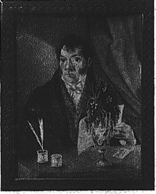 Ritratto di Valerio Valeri, autore ignoto